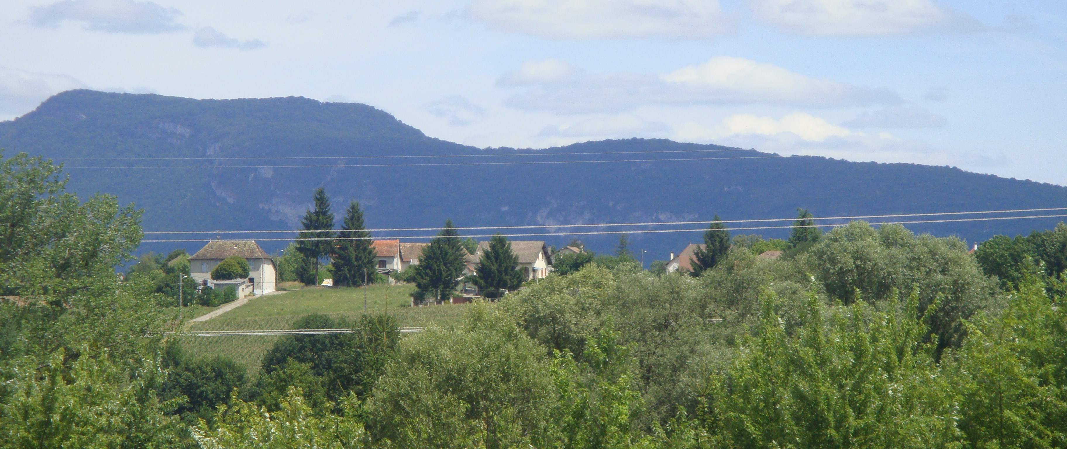 Vue de la commune des Avenières (Isère, FRANCE) depuis une attraction du parc de Walibi Rhône-Alpes.